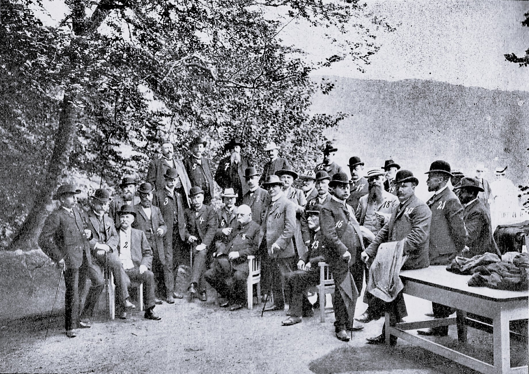 Aufnahme während der Landtagsfahrt durch das Fürstentum Lübeck 1907. 1. Bankdirektor tom Dieck; 3. OBM Tappenbeck, Oldenburg; 4. Ökonomierat Schröder, Landtagspräsident; 5. Lehrer Voß, Eutin; 6. BM Mahlstedt, Eutin; 7. Dauen; 8. Feldhus; 9. Wilcken; 10. BM Koch, Delmenhorst; 11. BM Feiget, Cloppenburg; 12. Gerdes; 13. Tews, Gleschendorf; 14. Franksen; 15. Wessels; 16. Rodenbrock; 17. Müller, Brake; 18. Alhorn, Osterburg; 19. Alhorn; 20. Schwarting; 21. Schute. Es fehlen: Tantzen, Vizepräsident des Landtags, Hug, Führer der Sozialdemokratie im Landtag und aus dem Fürstentum Lübeck: Voß, Pansdorf; Zeidler, Schwartau.